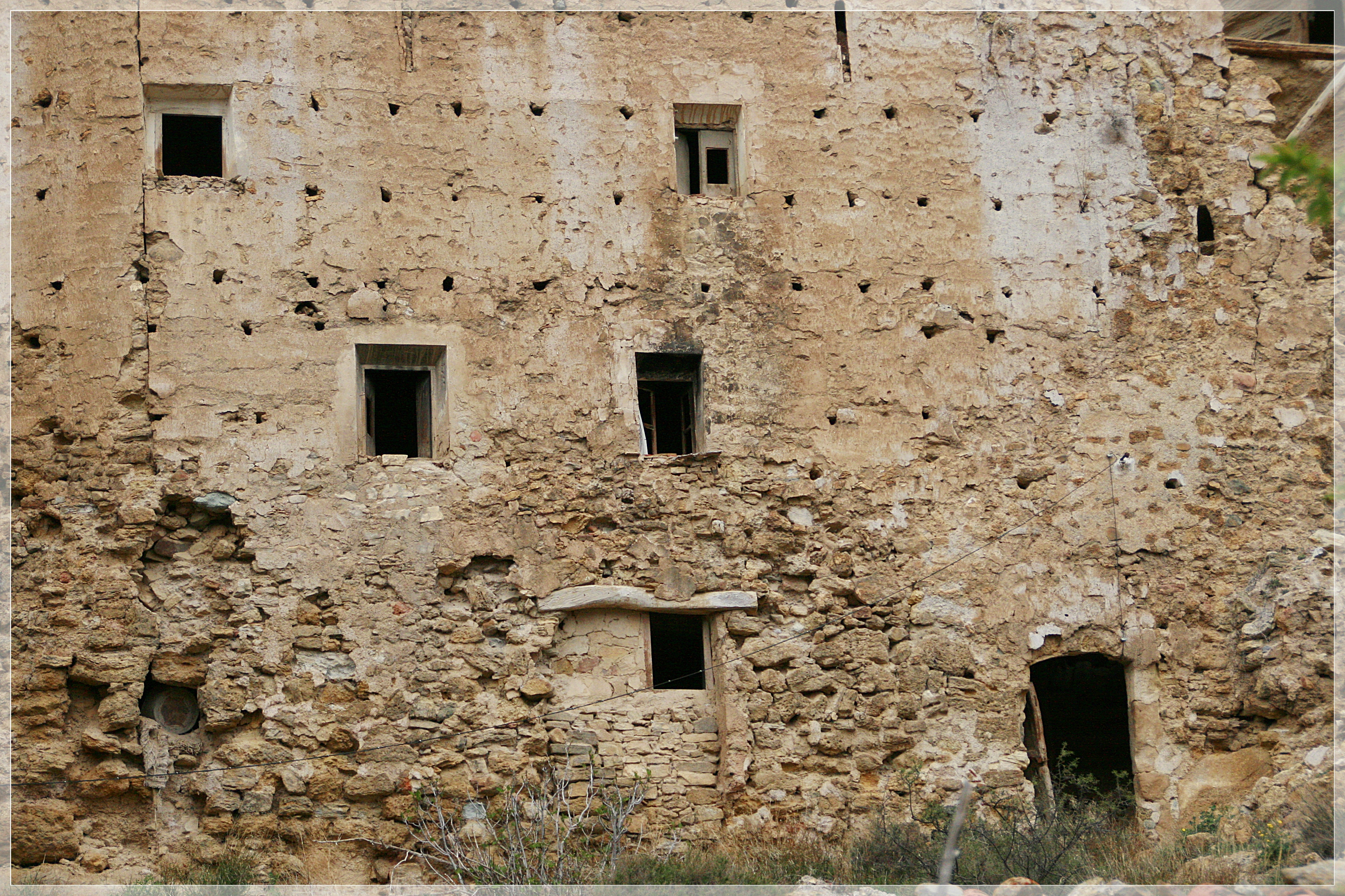 Palacio de Inestrillas (La Rioja)